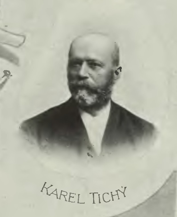 Portrét – Karel Tichý (1839-1908), Český podnikatel a politik.